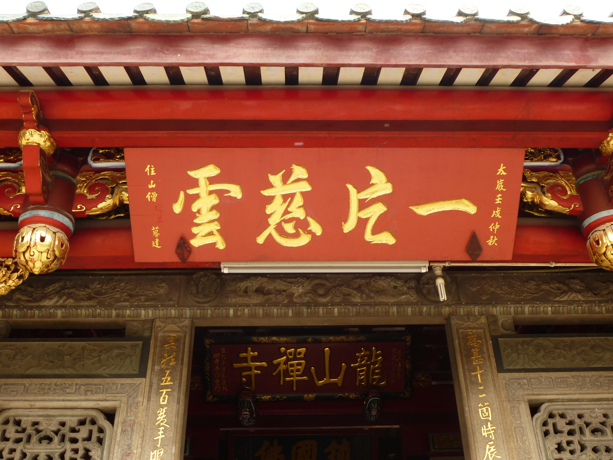 安海龙山寺